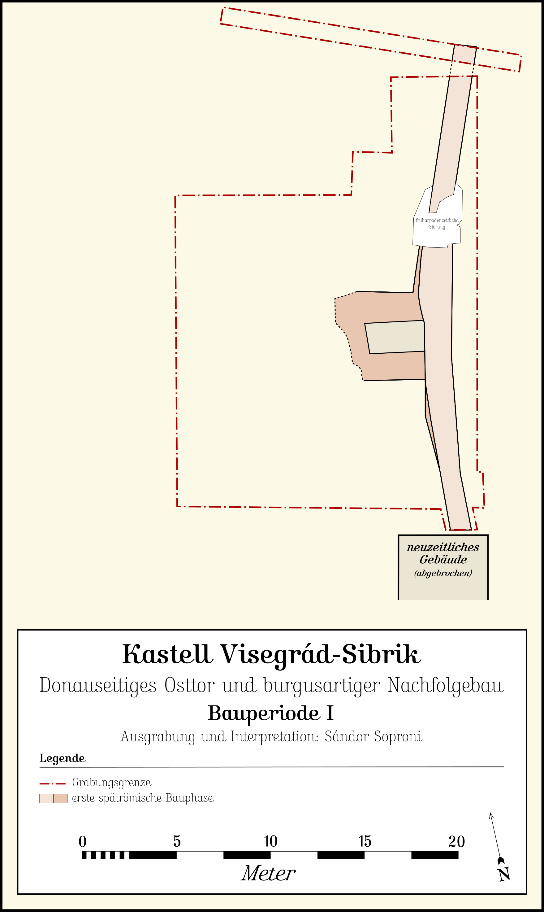 Kastell Visegrád–Sibrik, Ungarn: Erste Bauphase, Osttor. Quelle: Zsolt Máté (Hrsg.): Frontiers of the Roman Empire – Ripa Pannonica in Hungary (RPH), Nomination Statement, Vol. 2, National Office of Cultural Heritage, Budapest 2011, S. 202.